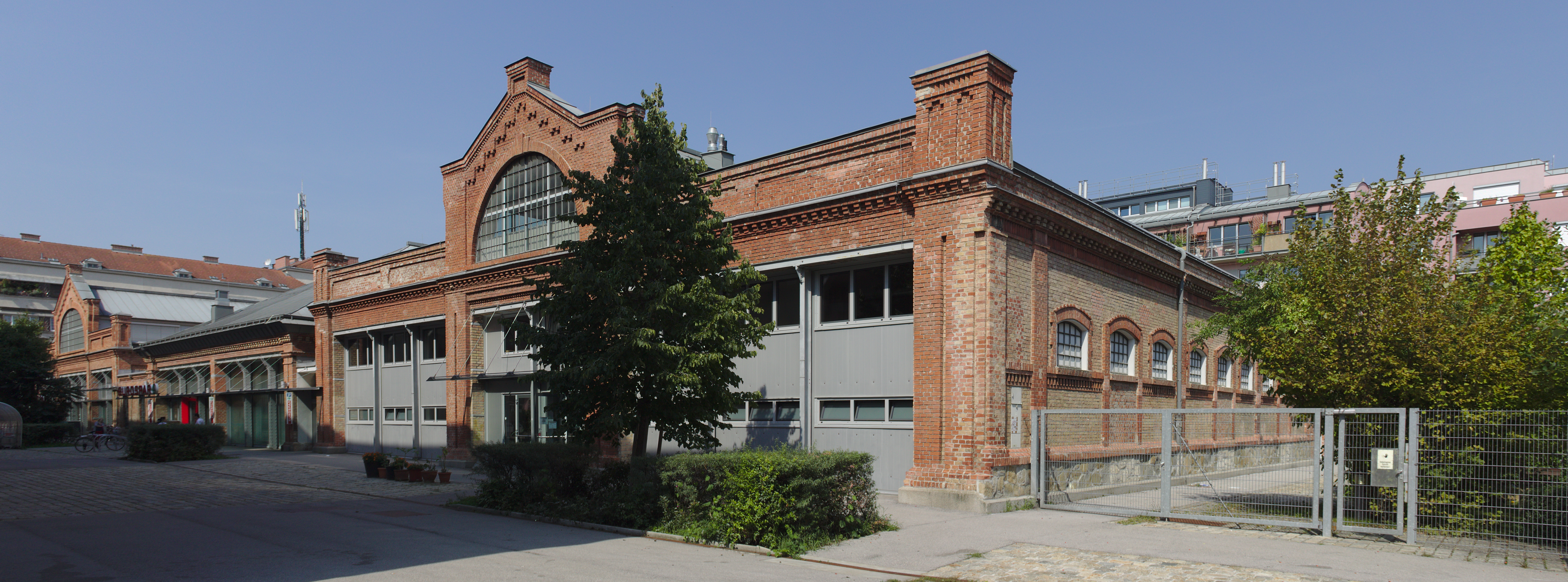 ehem. Betriebsbahnhof Währing/Remise Währing